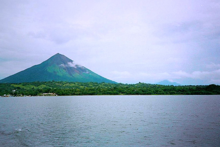 Lago de Nicaragua, Isla de Ometepe - Nicaragua, 1995